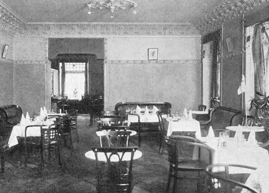 Restaurant 55an interiör.